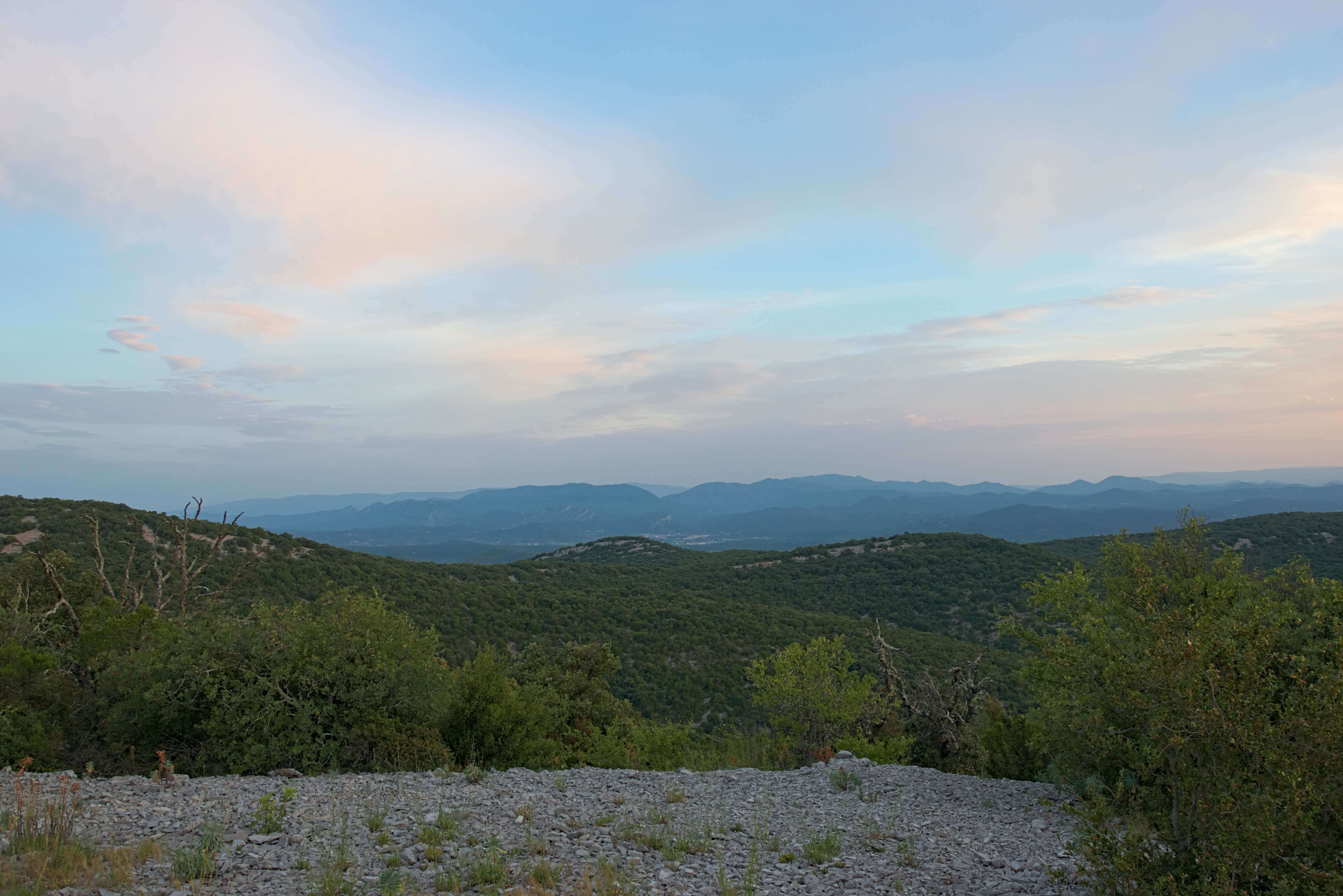 A l'aube, vue coté Cévennes depuis le Massif de Coutach dans le Gard. Lieu de la prise de vue nommé «la Moutette».